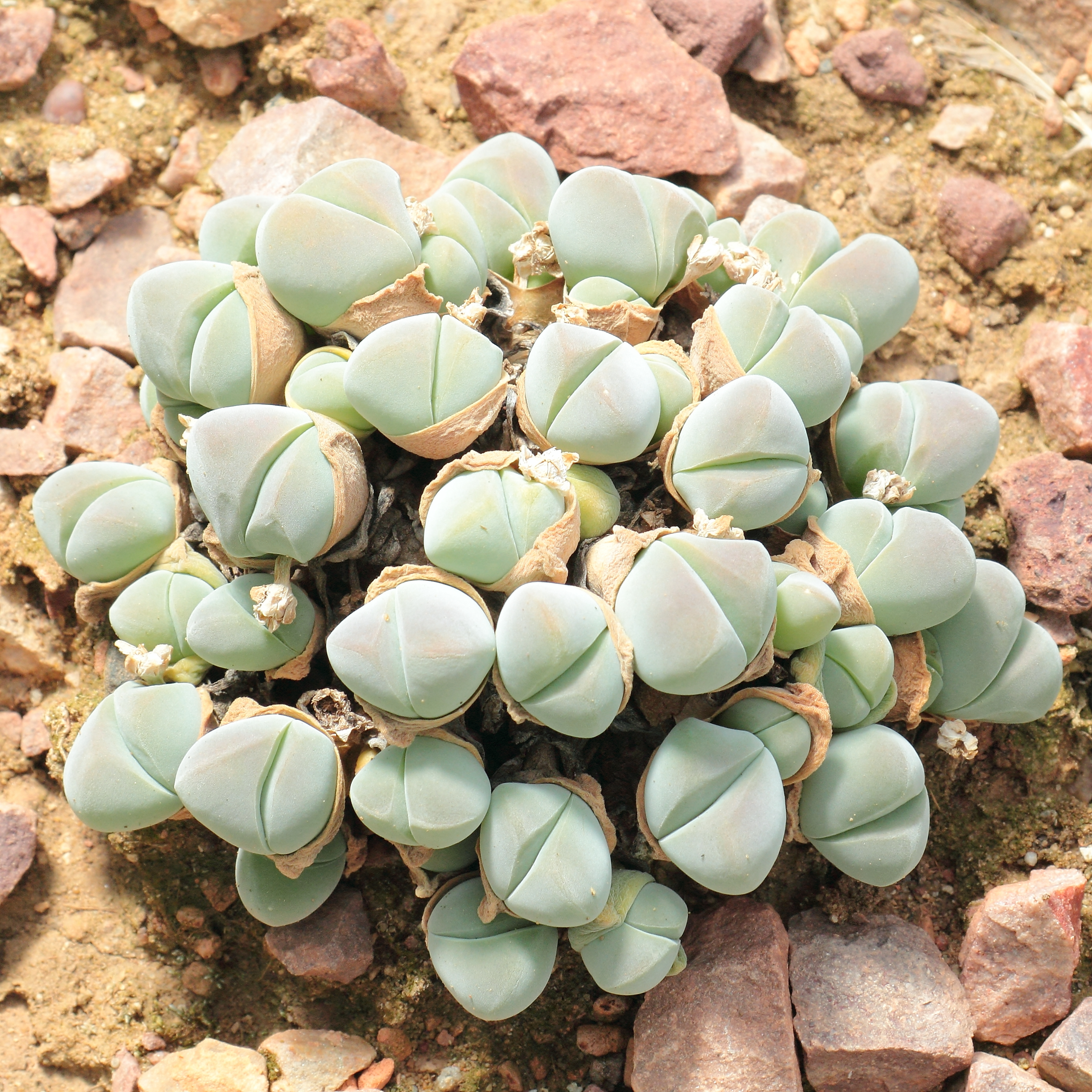 Gibbaeum dispar, identifierad med hjälp av befintlig skylt vid Kew Gardens, London.